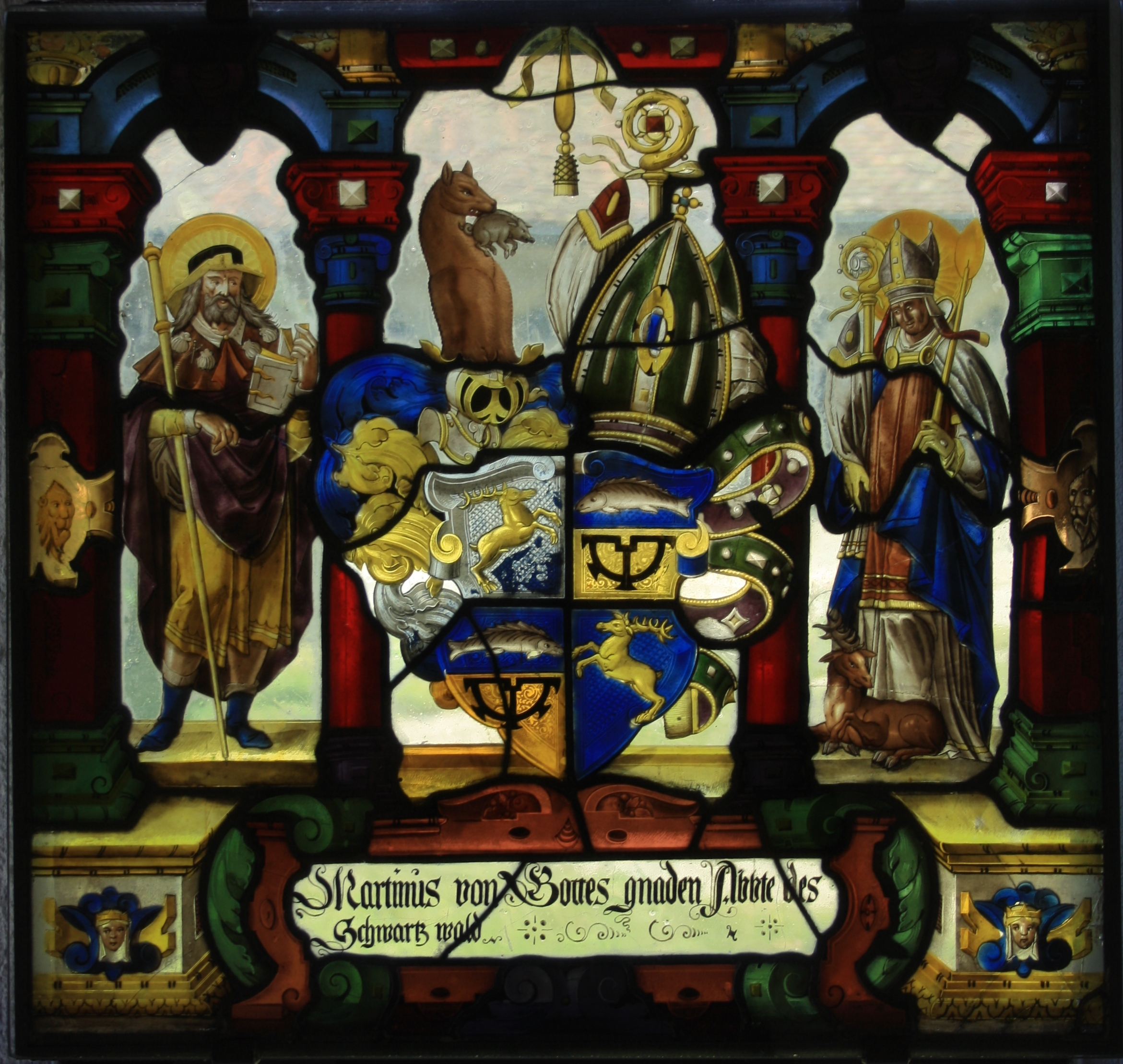 Wappenscheibe von Abt Martin Meister in St. Blasien von 1623 im Kreuzgang des Klosters Wettingen (Süd VI 1)